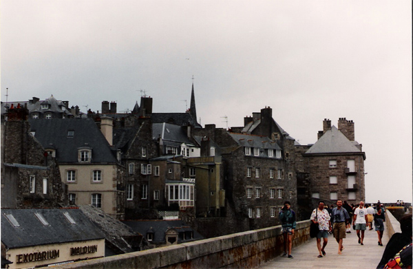 Saint-Malo - veduta dai bastioni.